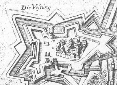 Kloster St. Jakob zu Mainz. Lage in der Zitadelle